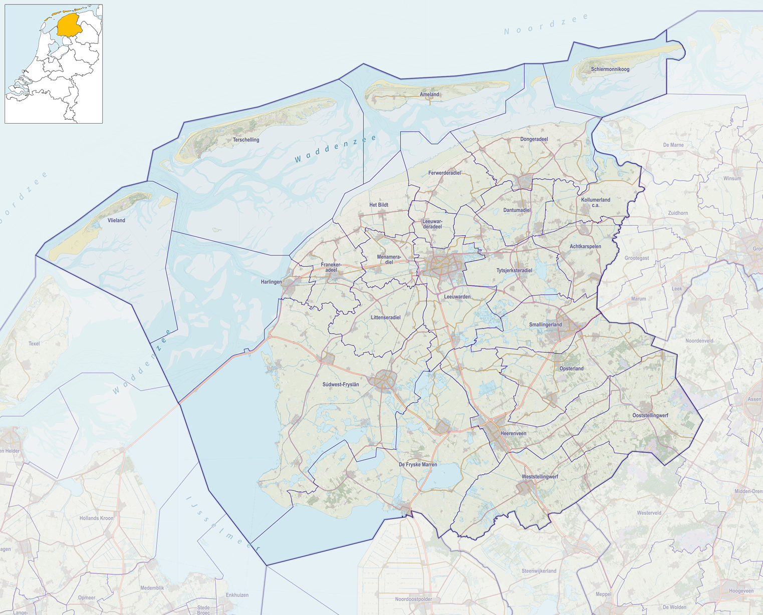 Positiekaartje van de provincie, variant "gemeentelabels"